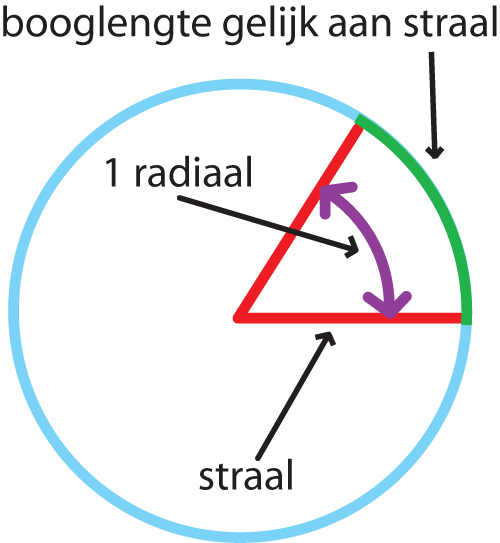 Een bijgewerkte versie van het figuur bij 'Radiaal'